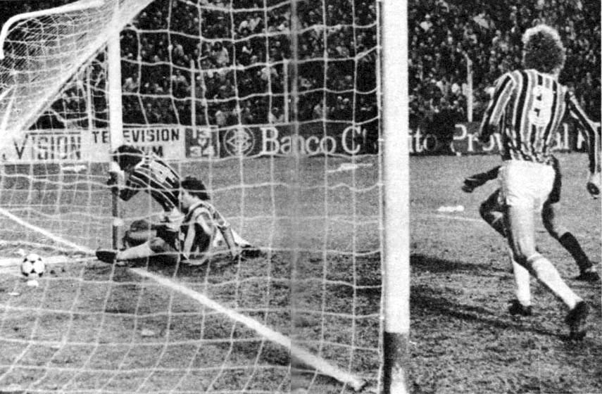 Nota completa da partida Estudiantes 3 - Grêmio 3. El Gráfico (12 de Julho de 1983) Edição 3327.